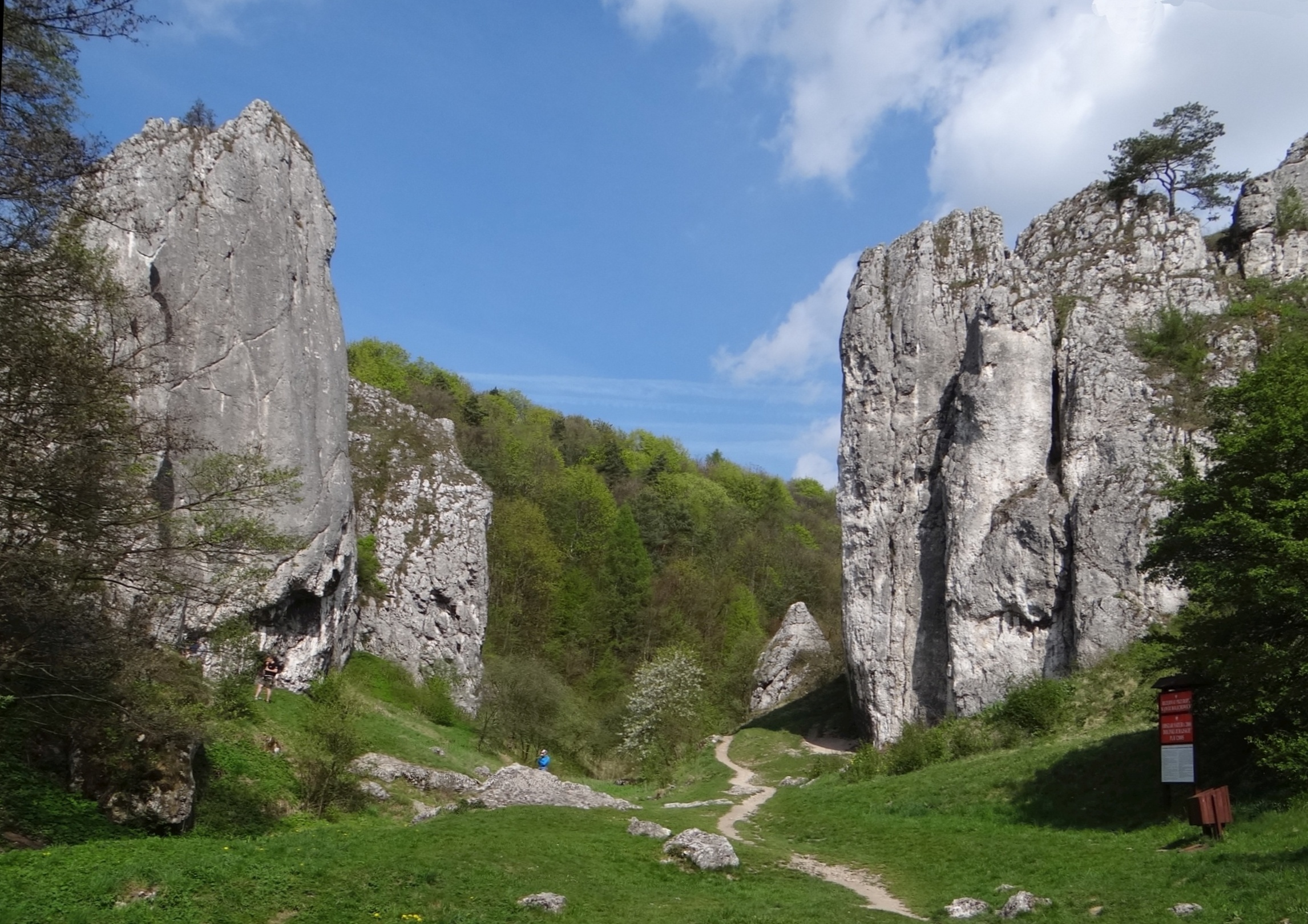 Brama Bolechowicka w Dolinie Bolechowickiej